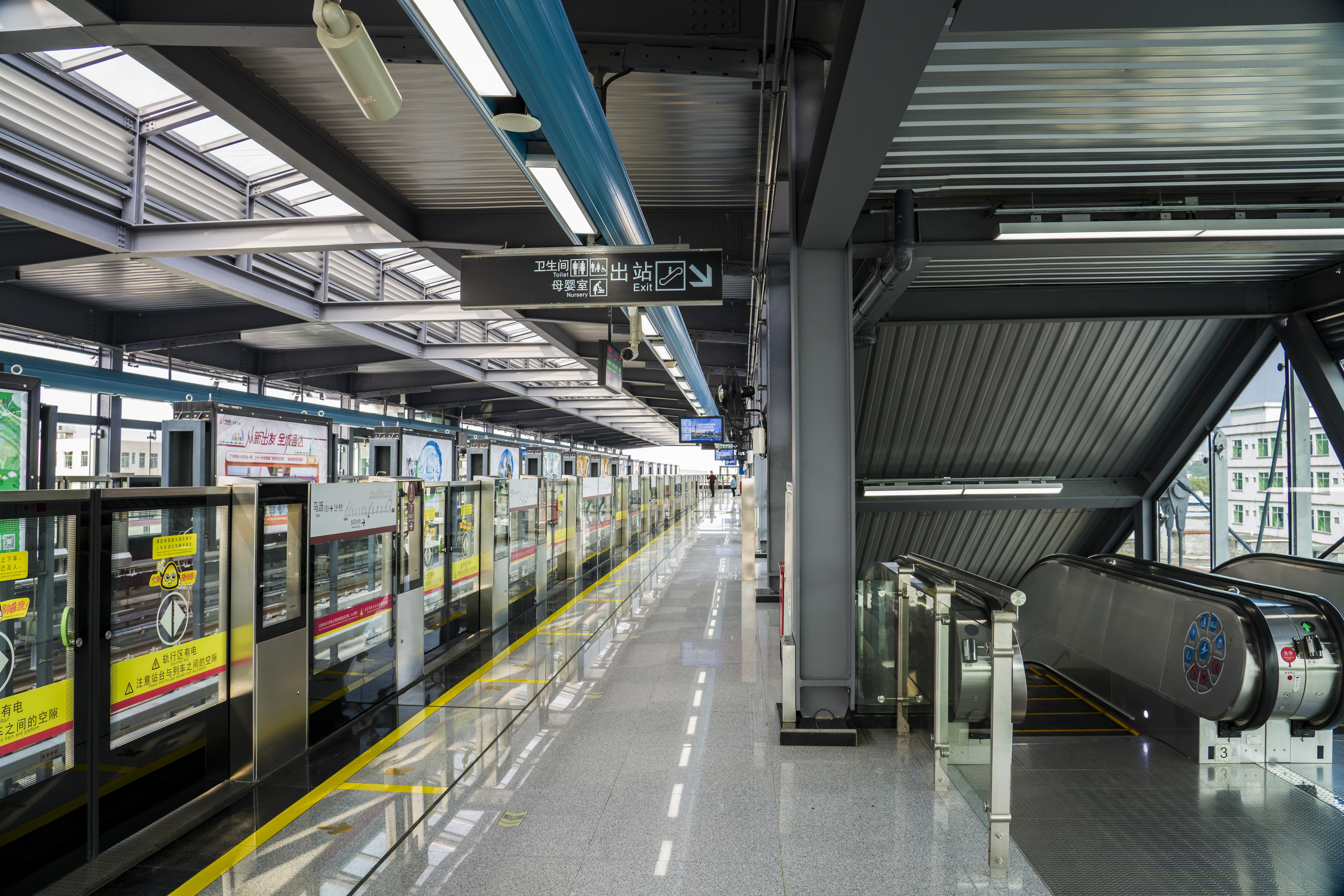 马沥站1号月台